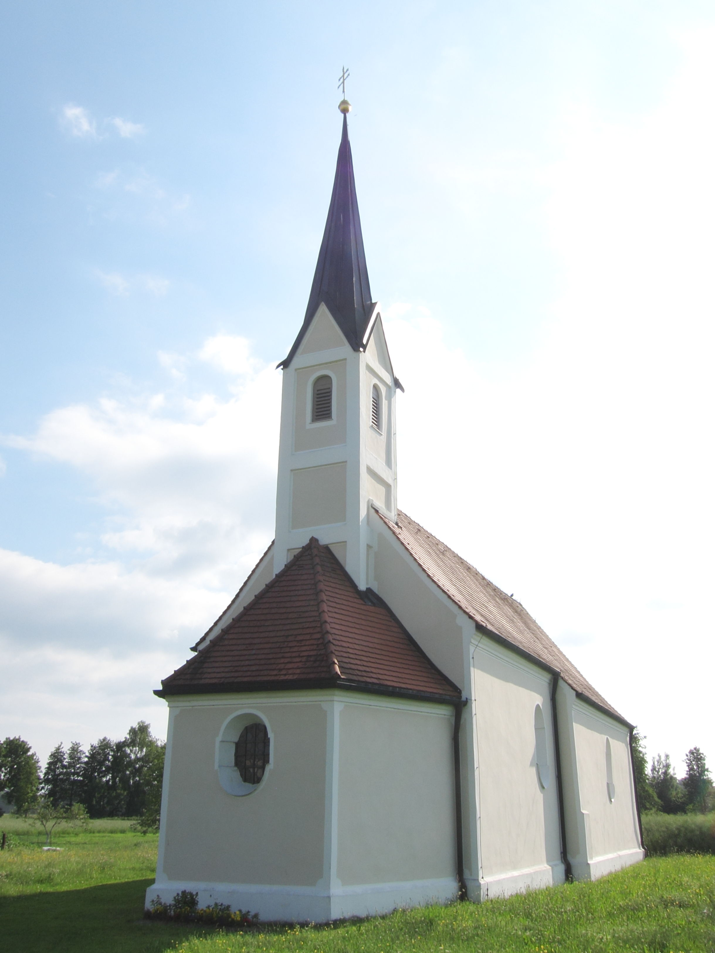 Altham; katholische Filialkirche St. Benedikt, Saalbau mit eingezogenem Chor und Spitzturm, Langhaus im Kern romanisch, sonst 17./18. Jahrhundert, Turm 1893; mit Ausstattung.